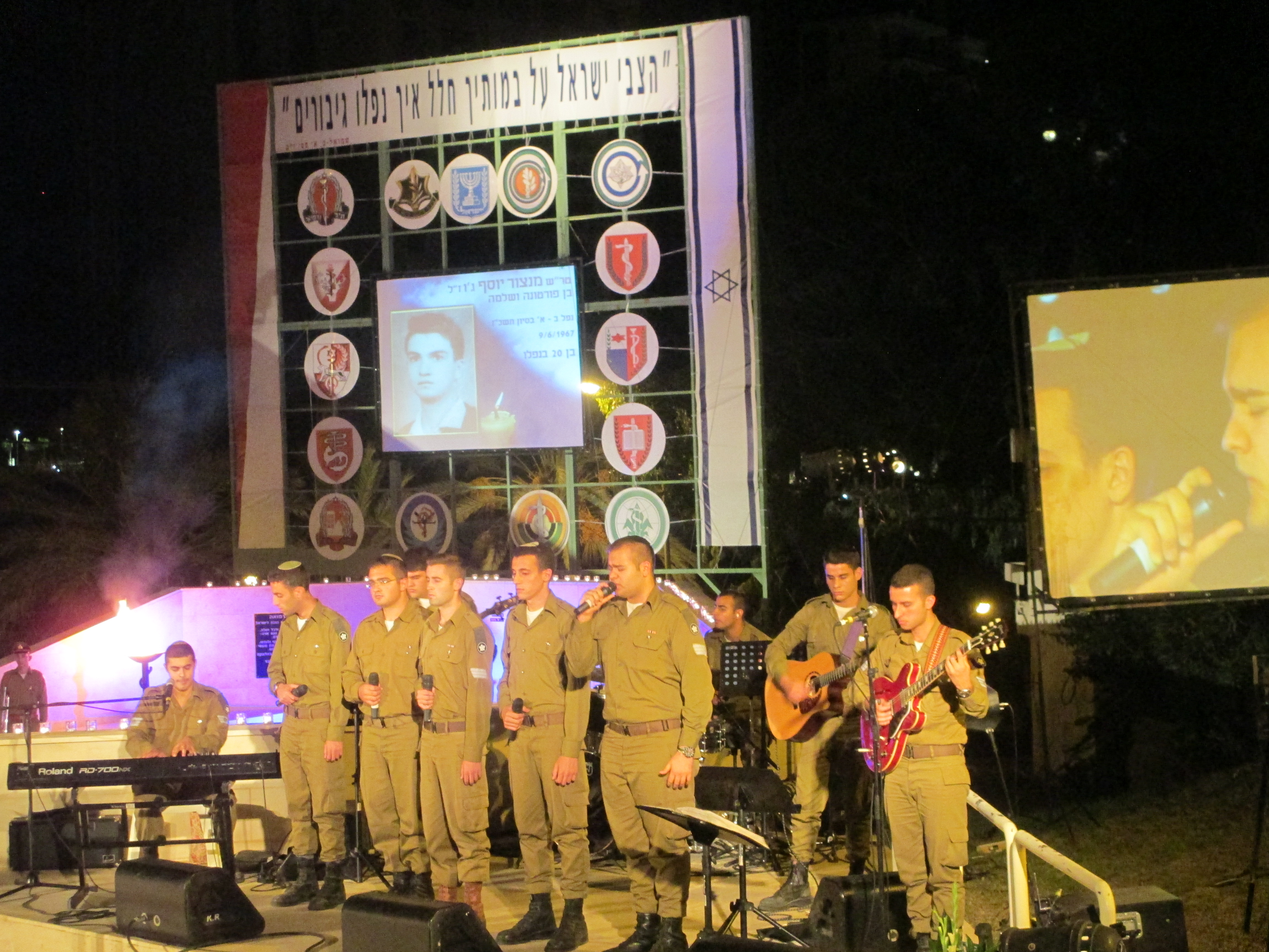 מקהלת הרבנות הצבאית בטקס זיכרון לחללי חיל הרפואה. חיפה, 2016.